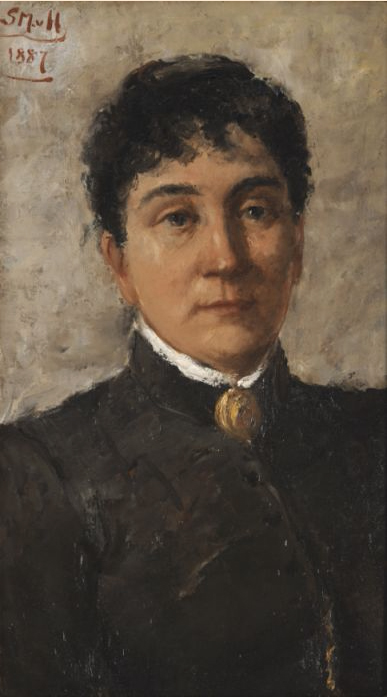 Portret Betzy Rezora Berg (1850-1922) geschilderd door Sina van Mesdag-van Houten (1834-1909)